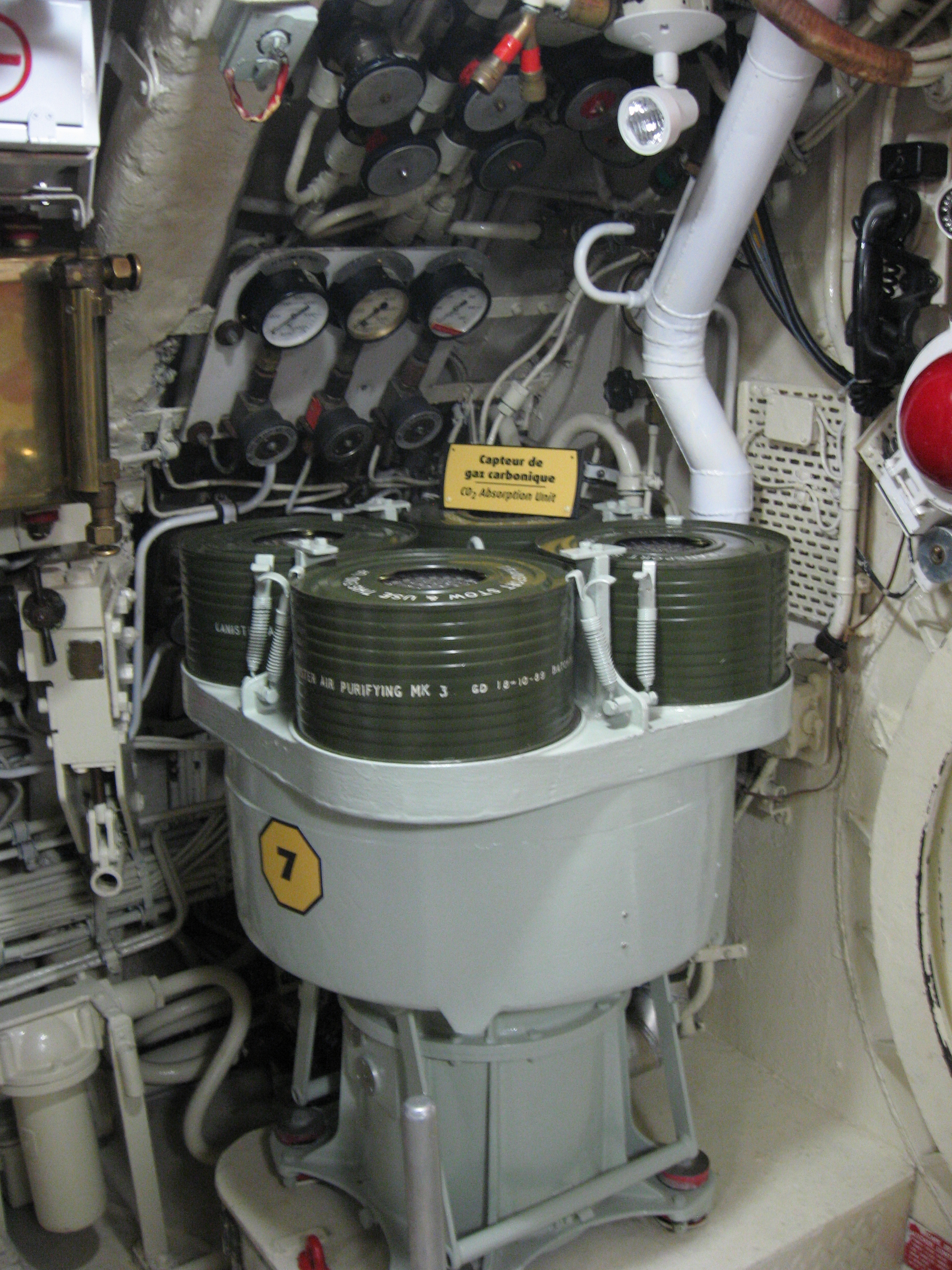 Capteurs de gaz carbonique du NCSM Onondaga